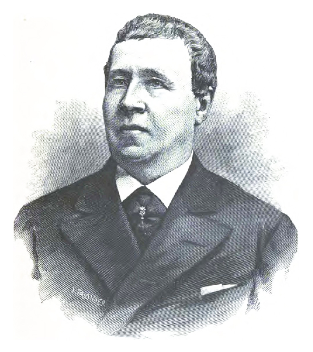 Georg Norrby (1816-1898)